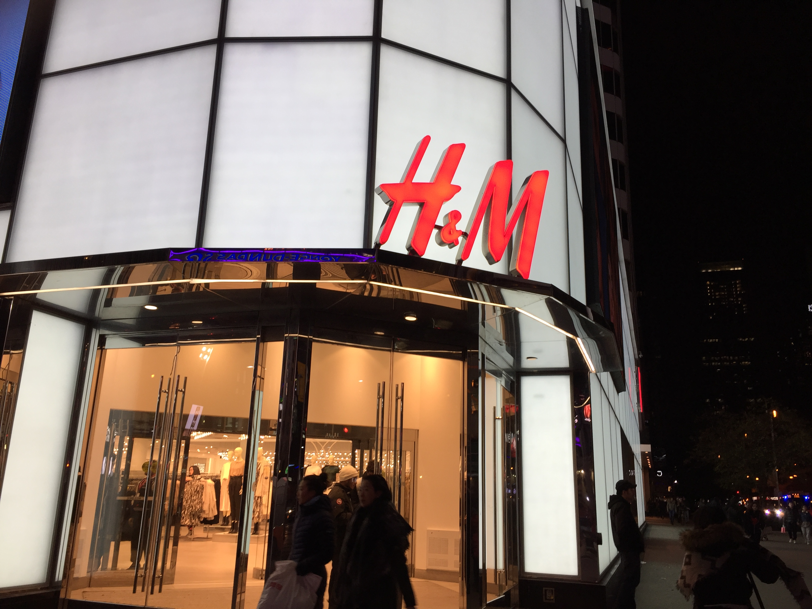 کوردی: ئێچ ئاند ئێم